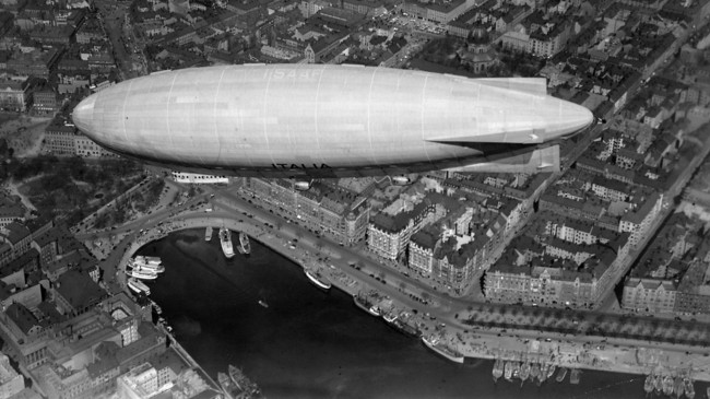 Italiaexpeditionens luftskepp över Nybroviken i Stockholm maj 1928.